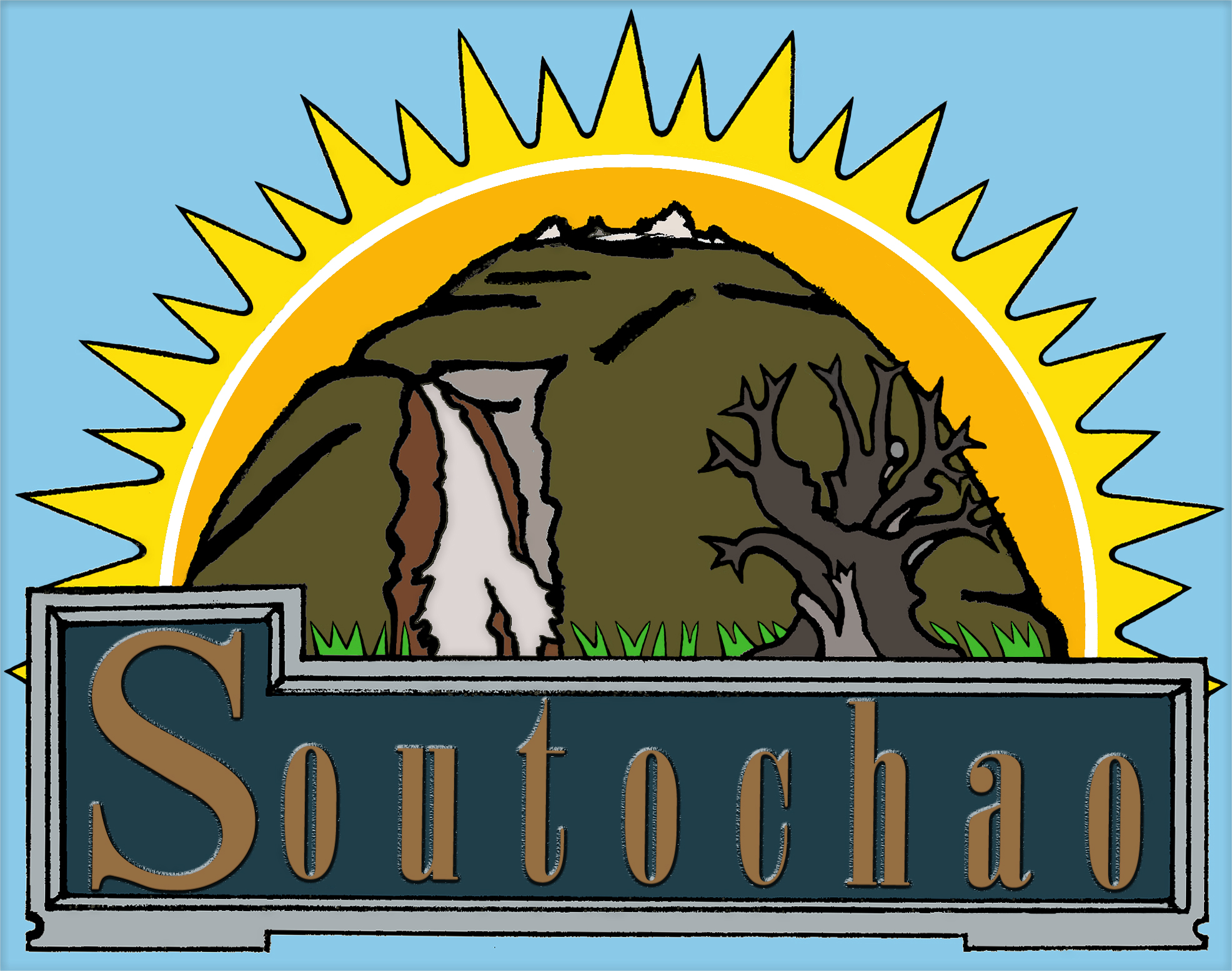 Logotipo Soutochao